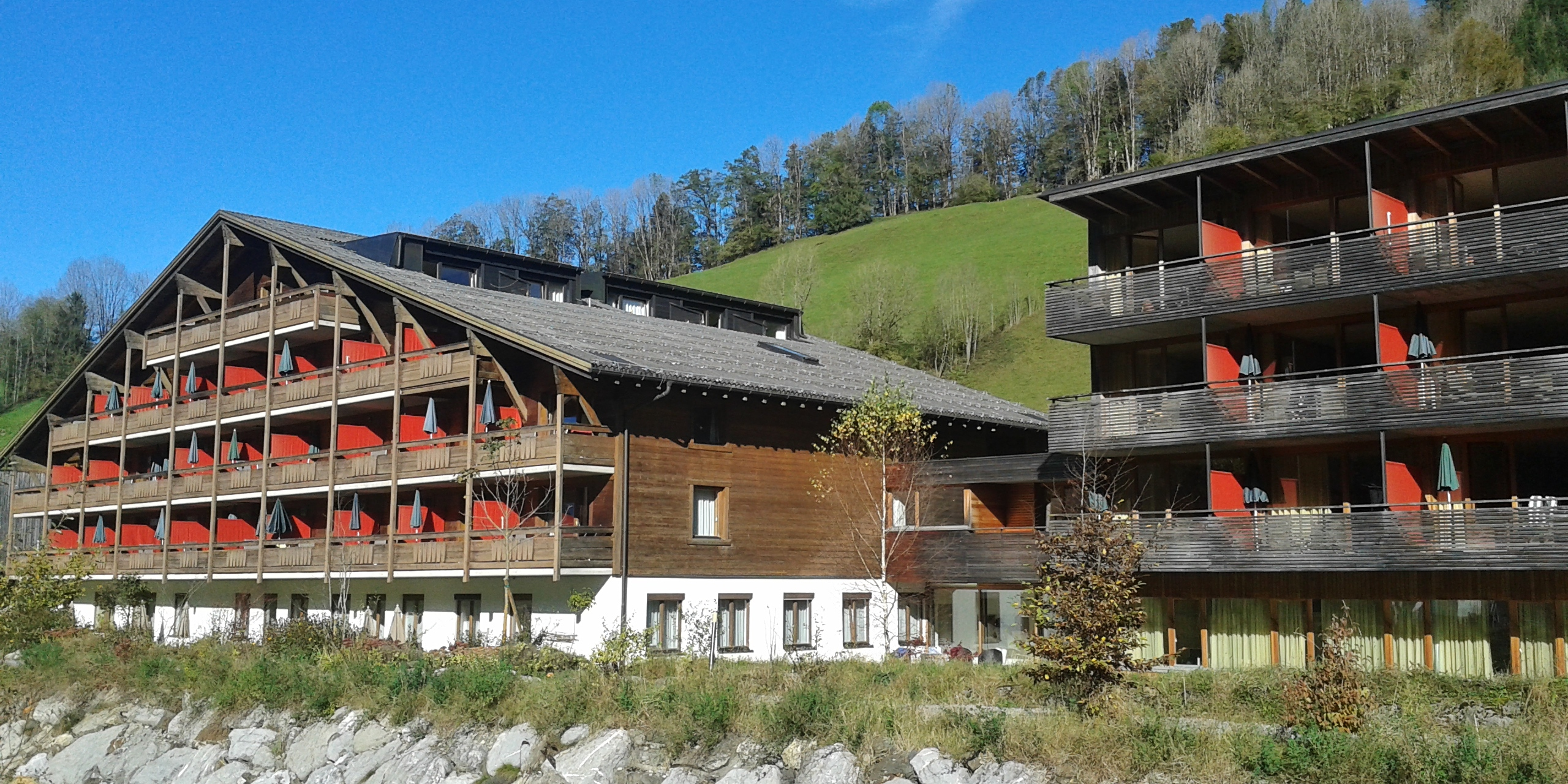 Gesundhotel in Bad Reuthe